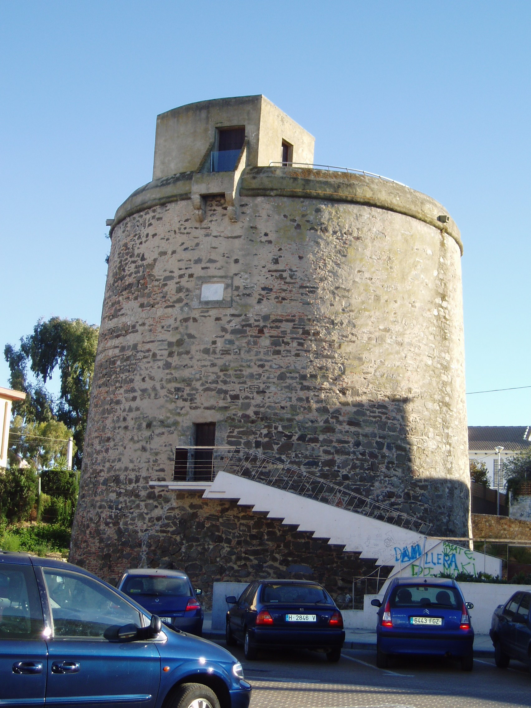 Torre en Punta Umbría, provincia de Huelva.